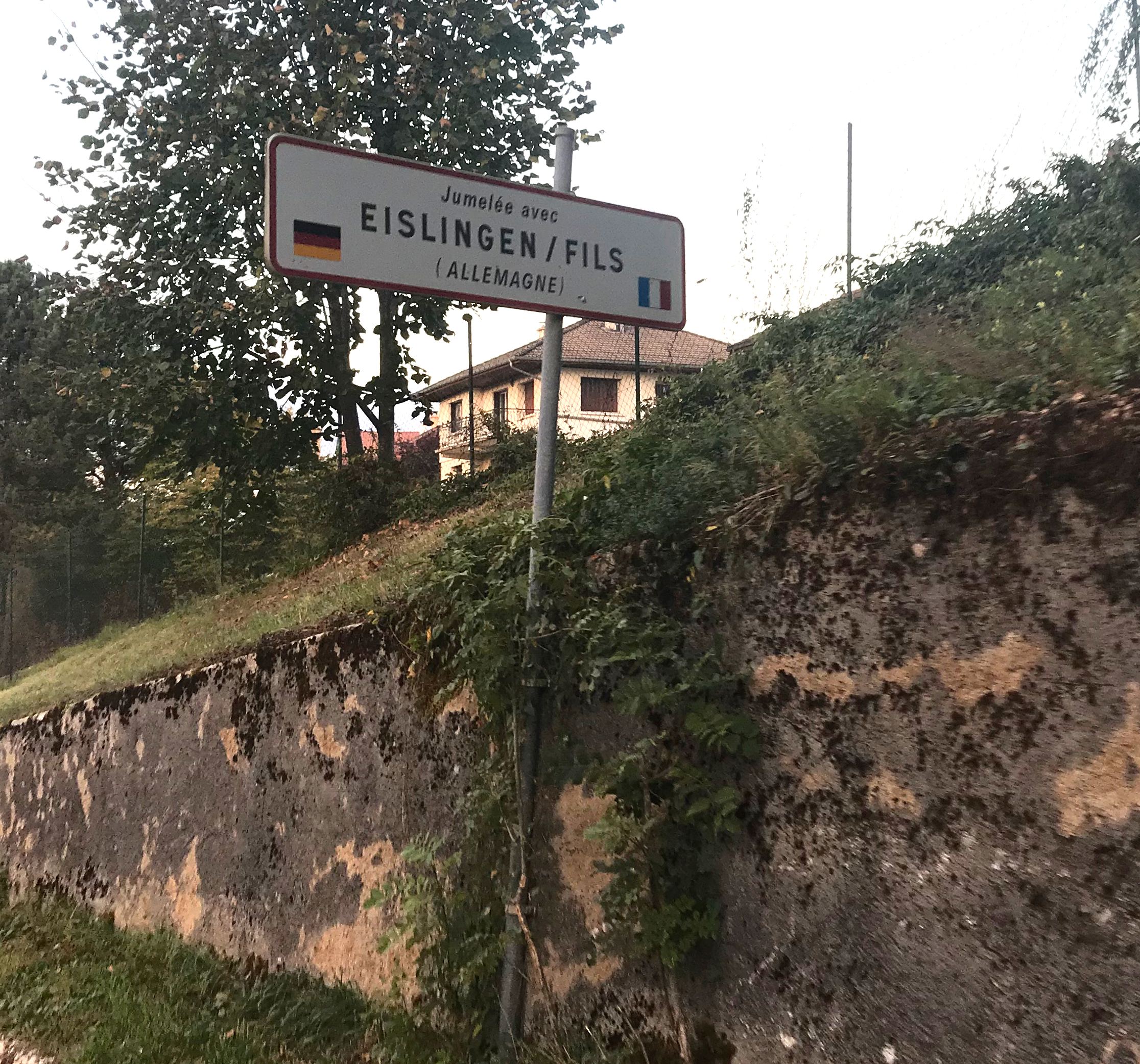 Panneau de jumelage à Oyonnax (Eislingen